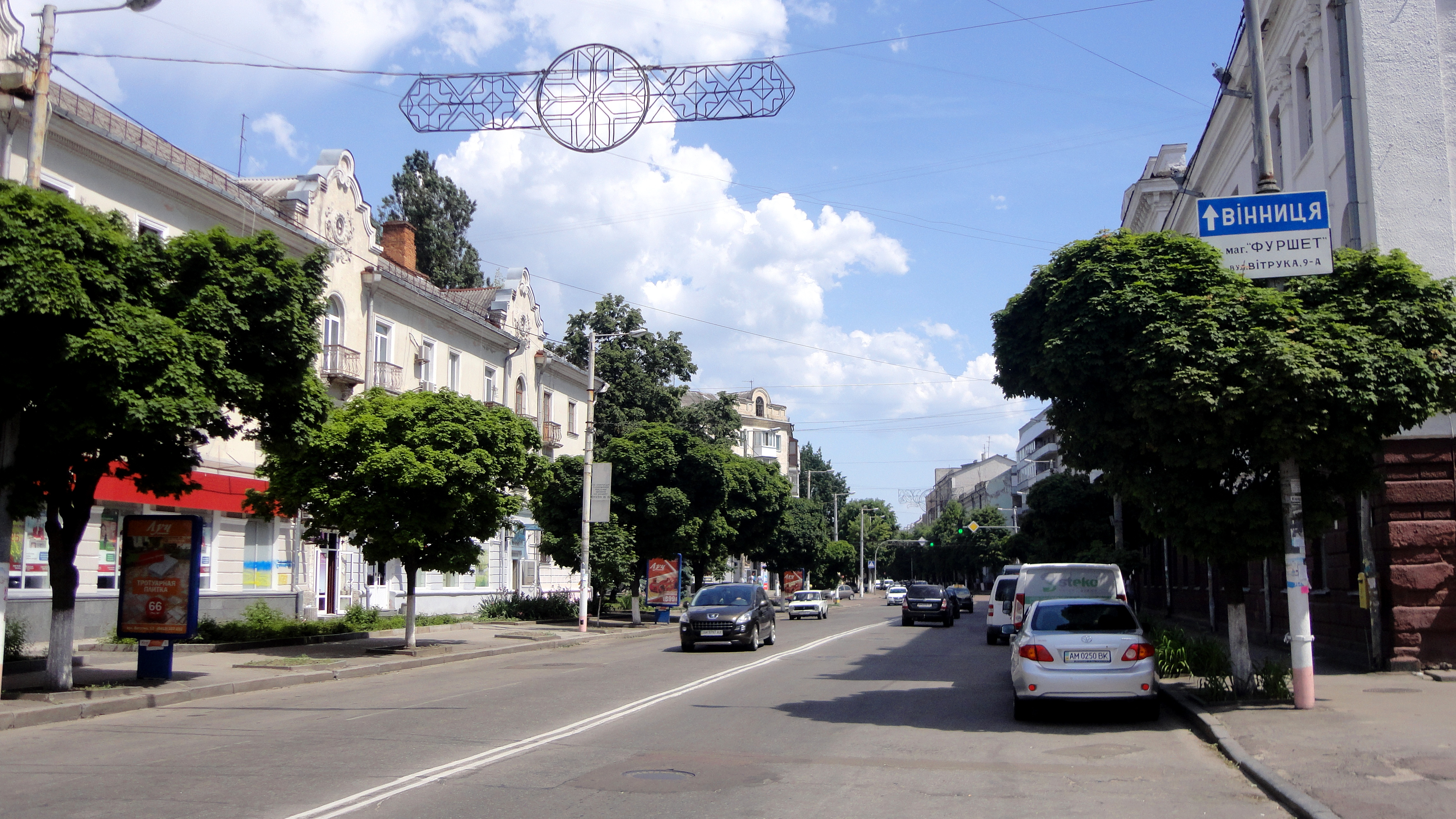 Початок вулиці Великої Бердичівської, Житомир